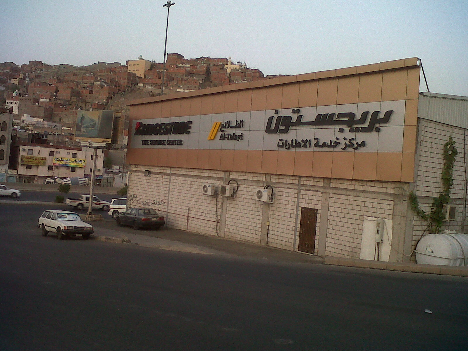 Al Kakiyyah, Mecca Saudi Arabia